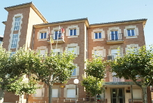 Fachada de la Biblioteca Pública de Soria